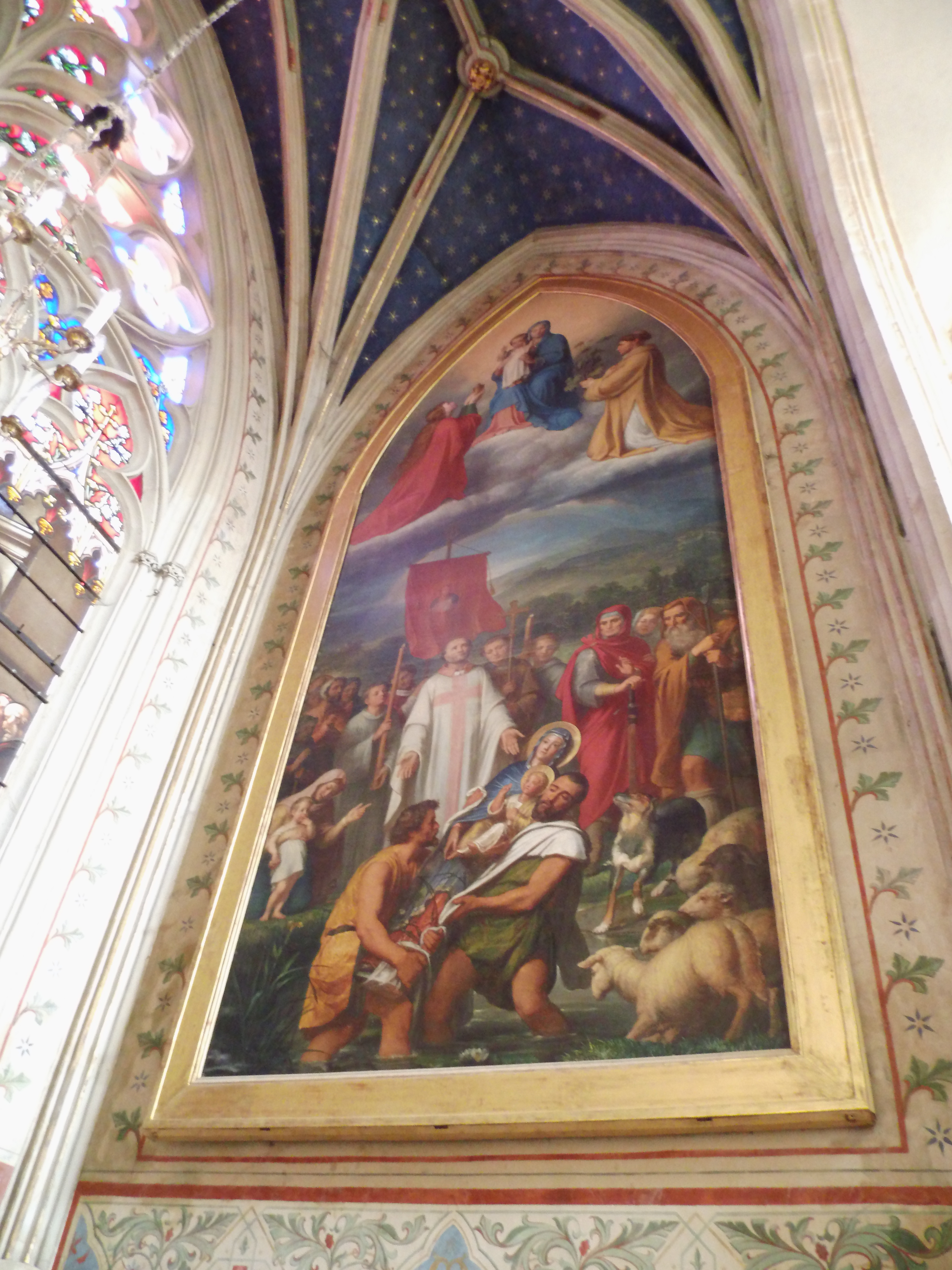 Dans une chapelle latérale